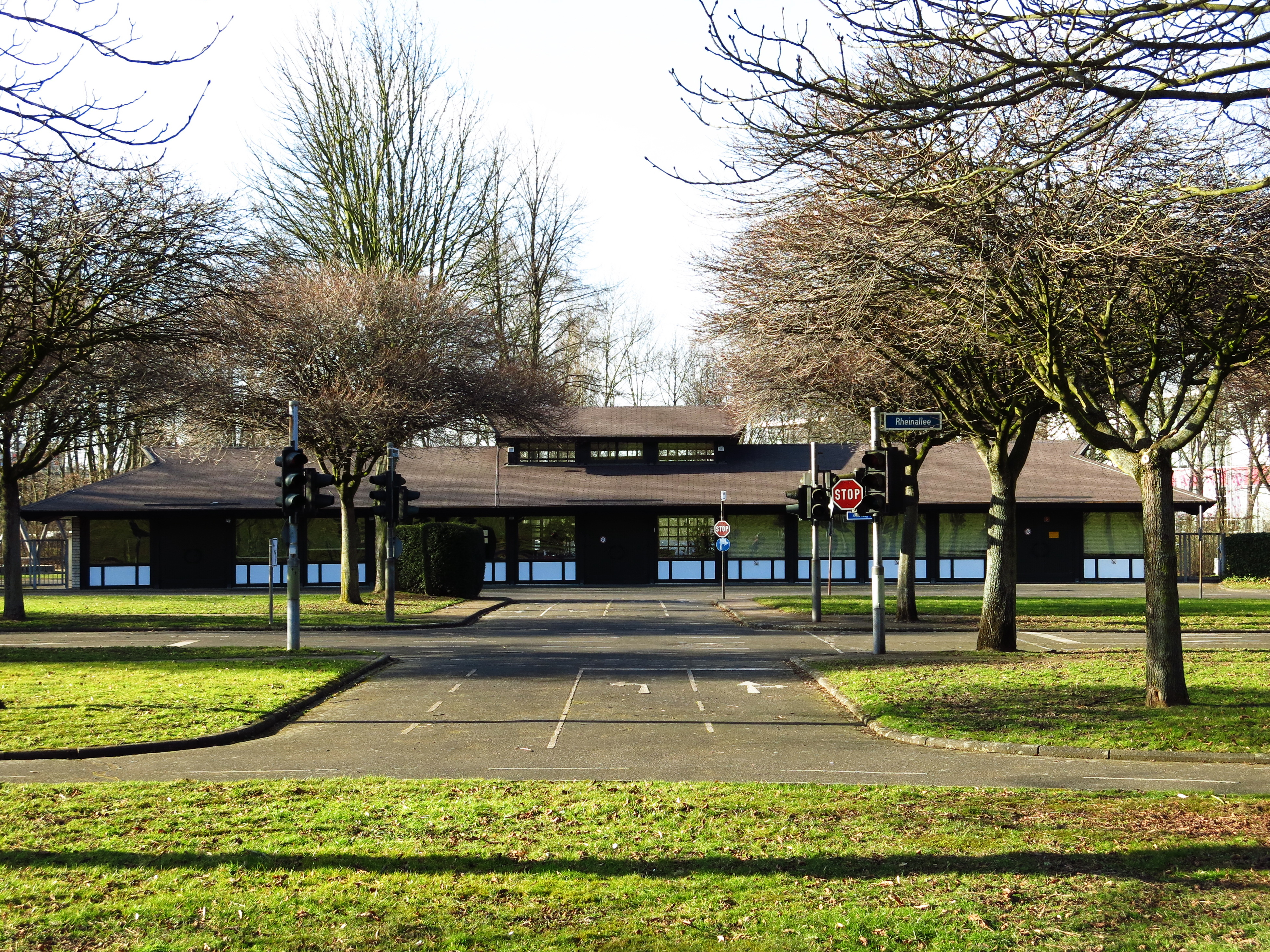 Jugendverkehrsschule Bonn